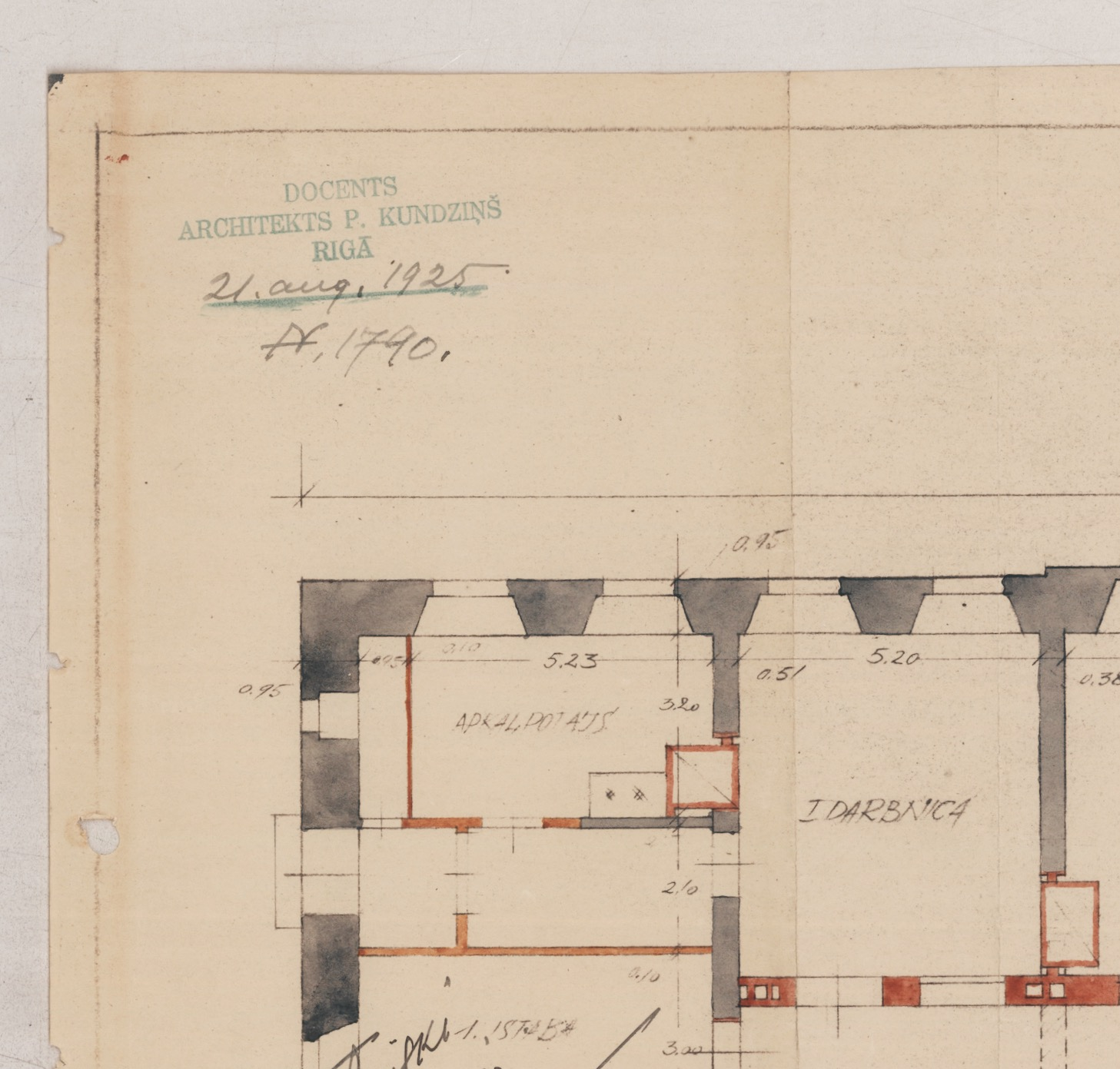 Paula Kundziņa zīmogs 1925. gadā Bērzmuižas kungu mājas pārbūvē par skolu. Pilns attēls atrodas Latvijas Valsts arhīva glabātavā.